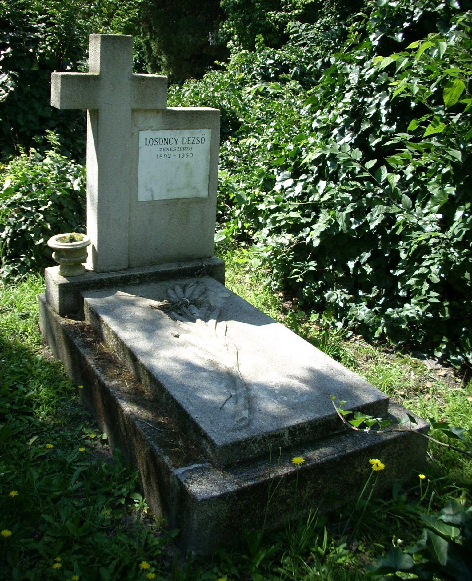 Losonc[z]y Dezső (1892–1950) karmester, zeneszerző sírja. (Kerepesi temető; 34. parcella, 18. sor, 24. sír